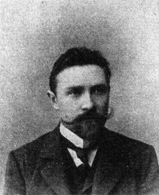 Österreichischer Politiker, Reichsratswahl 1907, Name siehe Dateiname